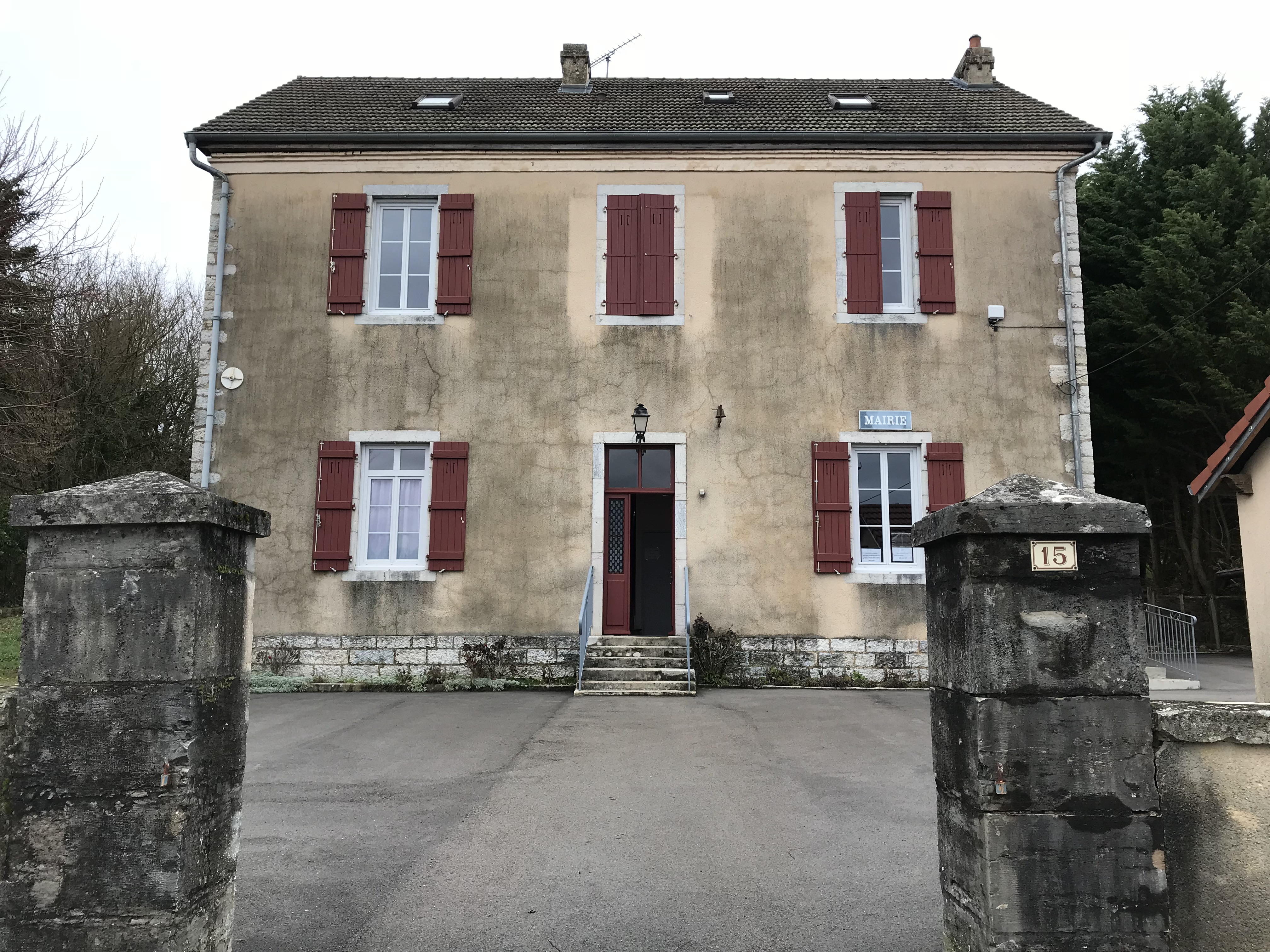 Image de Chatelay (Jura) en janvier 2018.